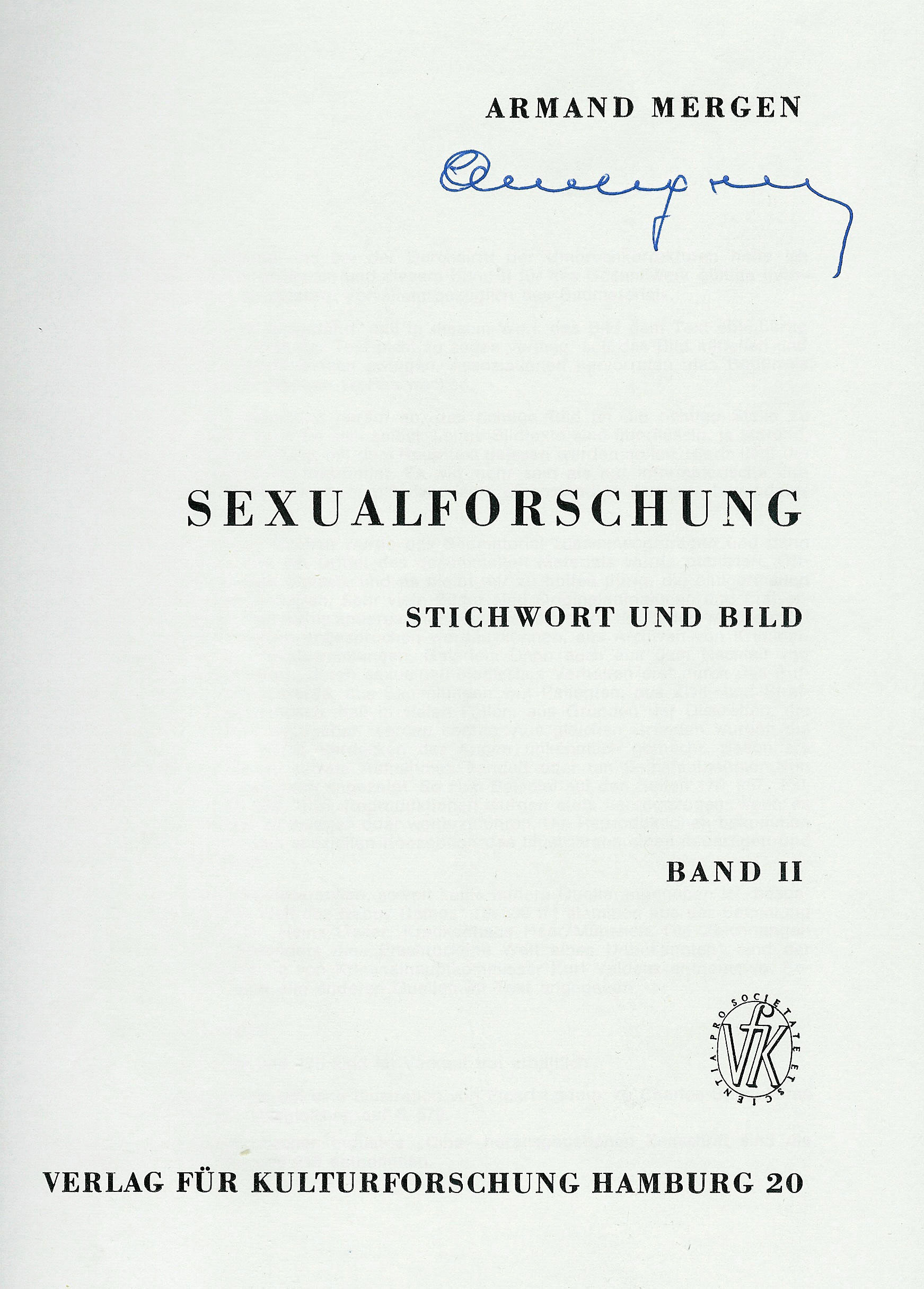 Mergen.